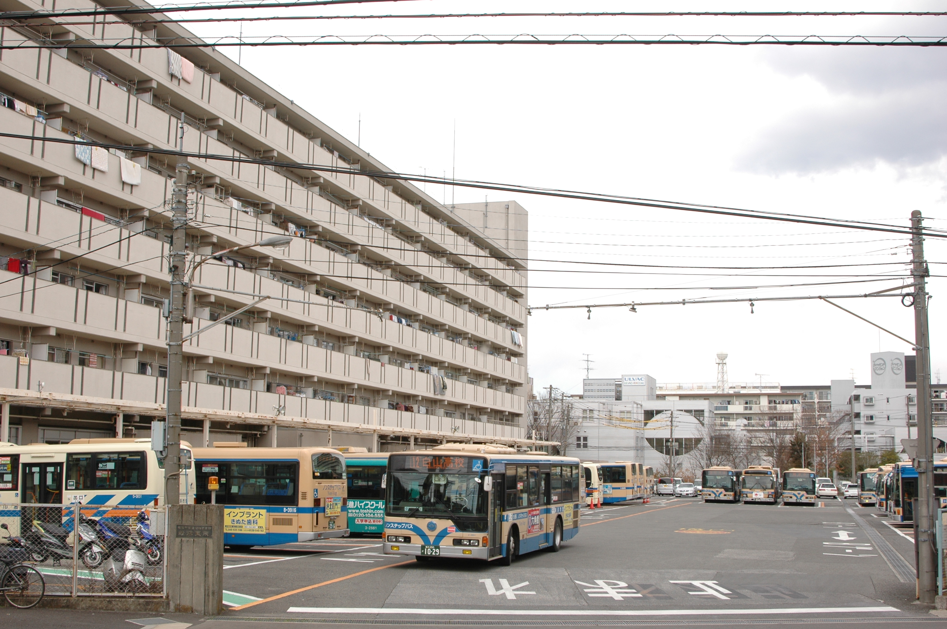 横浜市営バス港北営業所正面出入口、2012年3月12日撮影